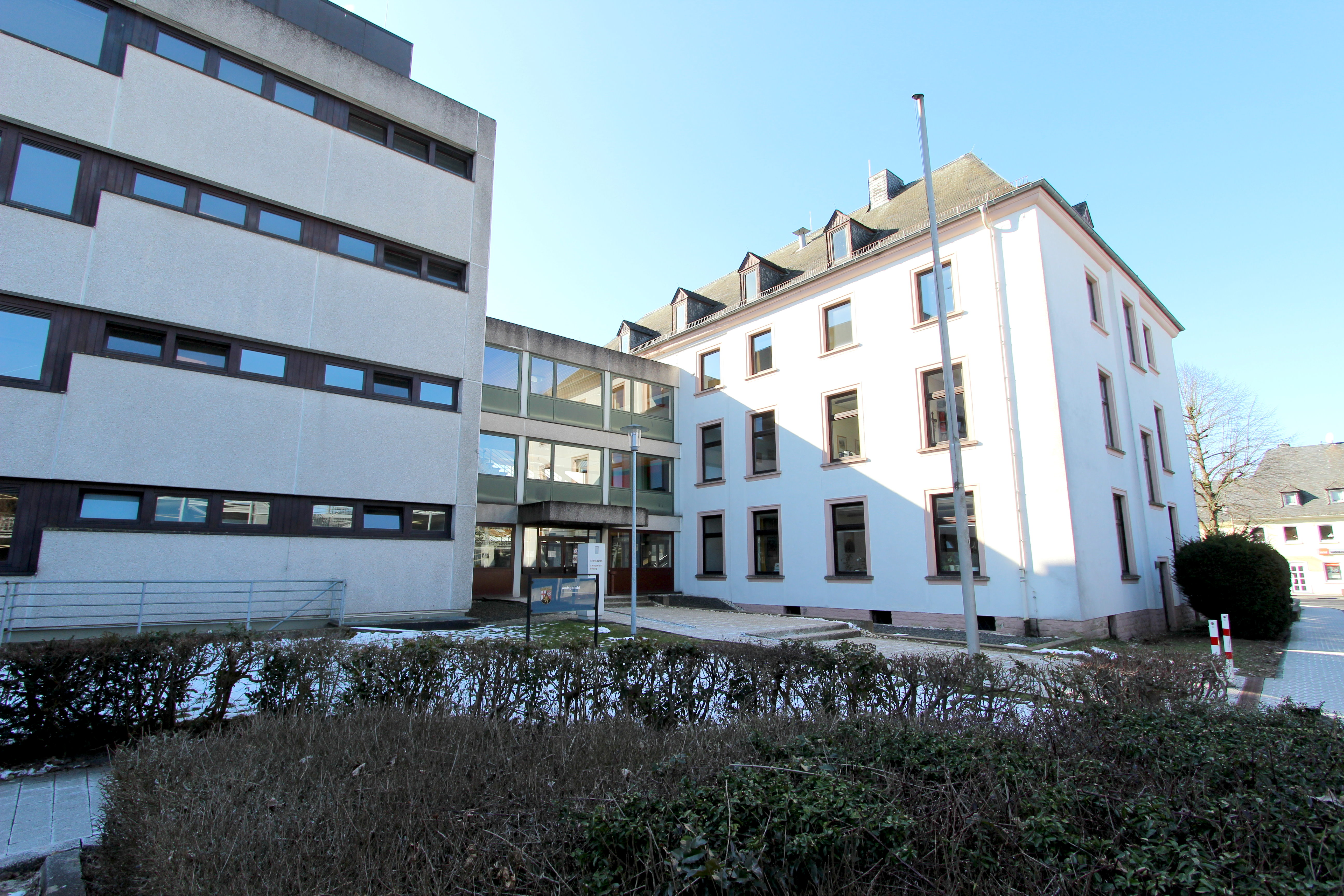 54634 Bitburg, Gerichtsstraße 2. Das Amtsgericht Bitburg ist für alle Angelegenheiten zuständig, die bei einem Amtsgericht anhängig gemacht werden können und ist damit zugleich Zivilgericht, Familiengericht, Grundbuchamt, Betreuungsgericht, Mahngericht, Nachlassgericht und Registergericht. Aufnahme von 2018.